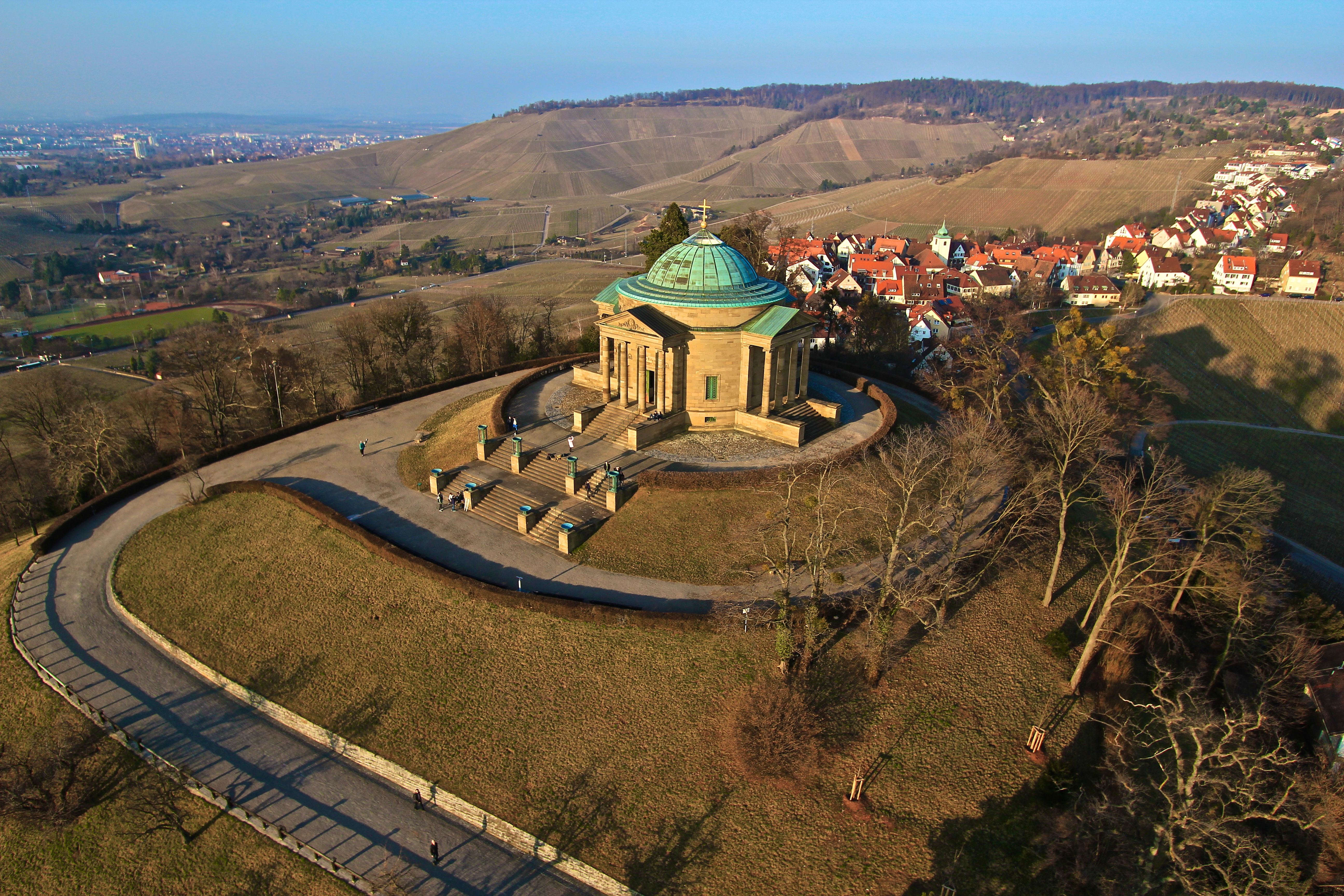 Grabkapelle auf dem Württemberg, aufgenommen mit einem Oktokopter aus ca. 40 m Höhe. Rechts dahinter der Stuttgarter Stadtteil Rotenberg.